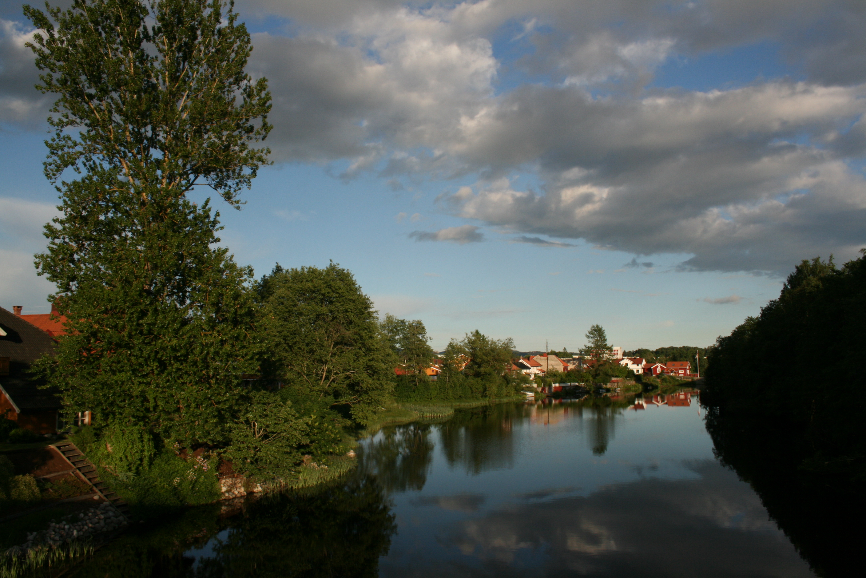 Falkumelva